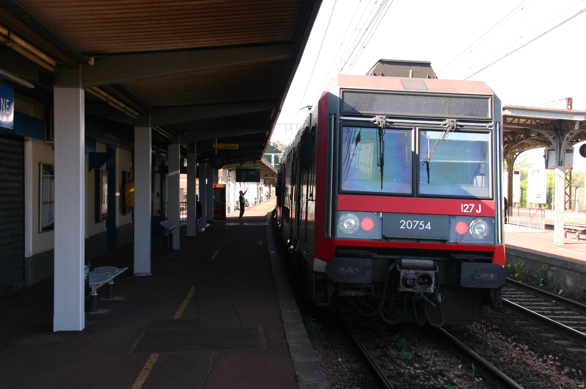 La Gare de Montgeron-Crone, Montgeron, département de l'Essonne, France